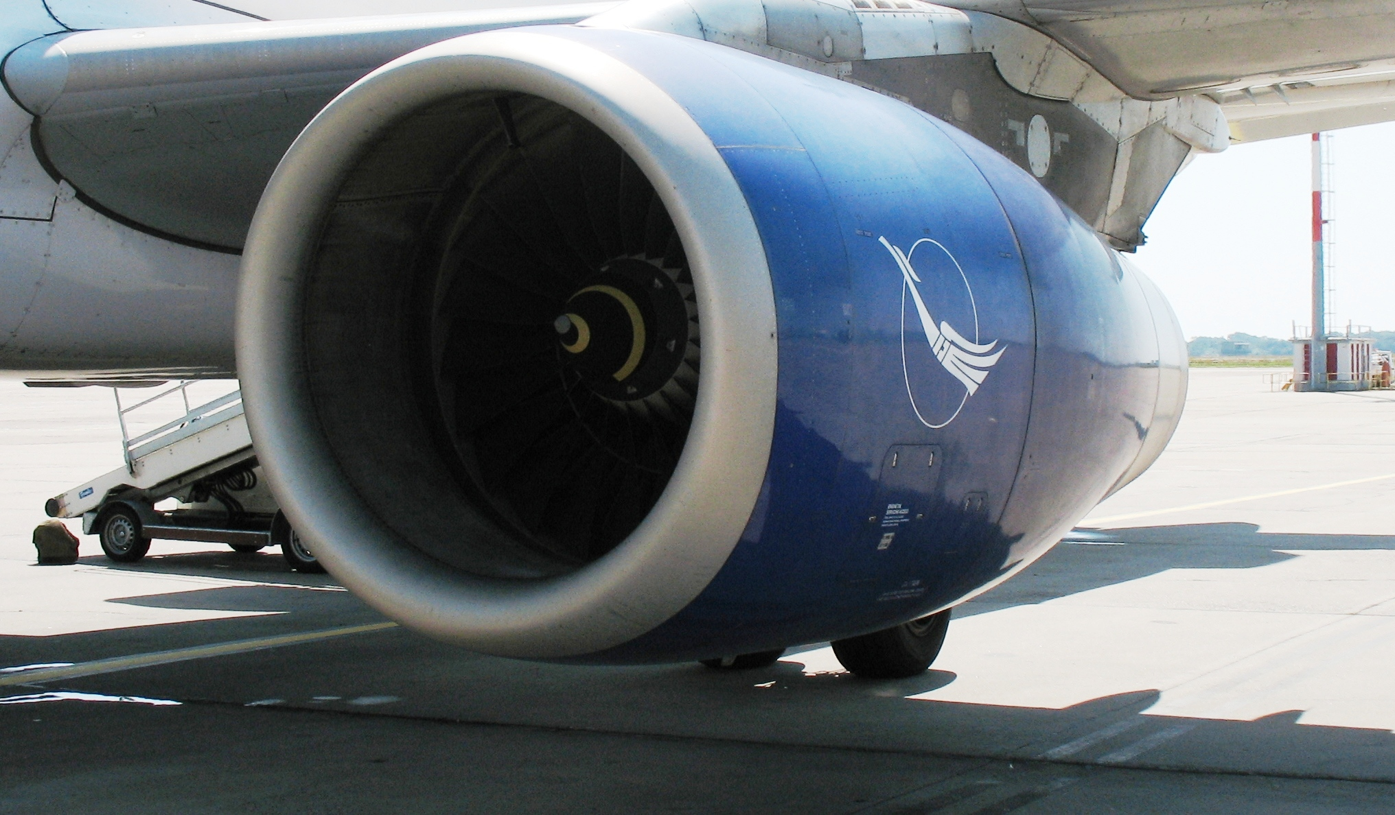 Turbine eines Flugzeugs der Gesellschaft "Syrianair" (Airbus A 320)